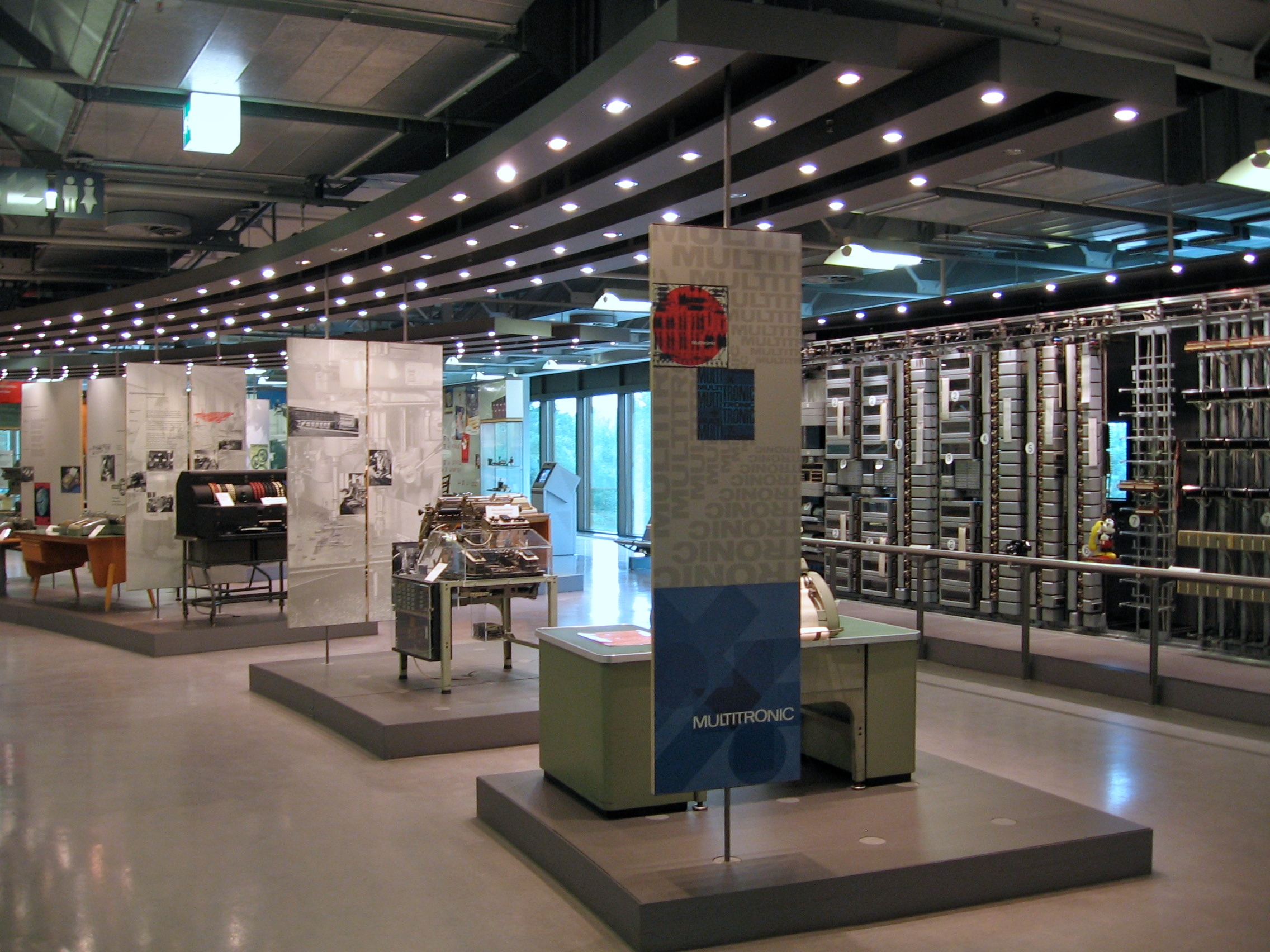 Heinz Nixdorf MuseumsForum